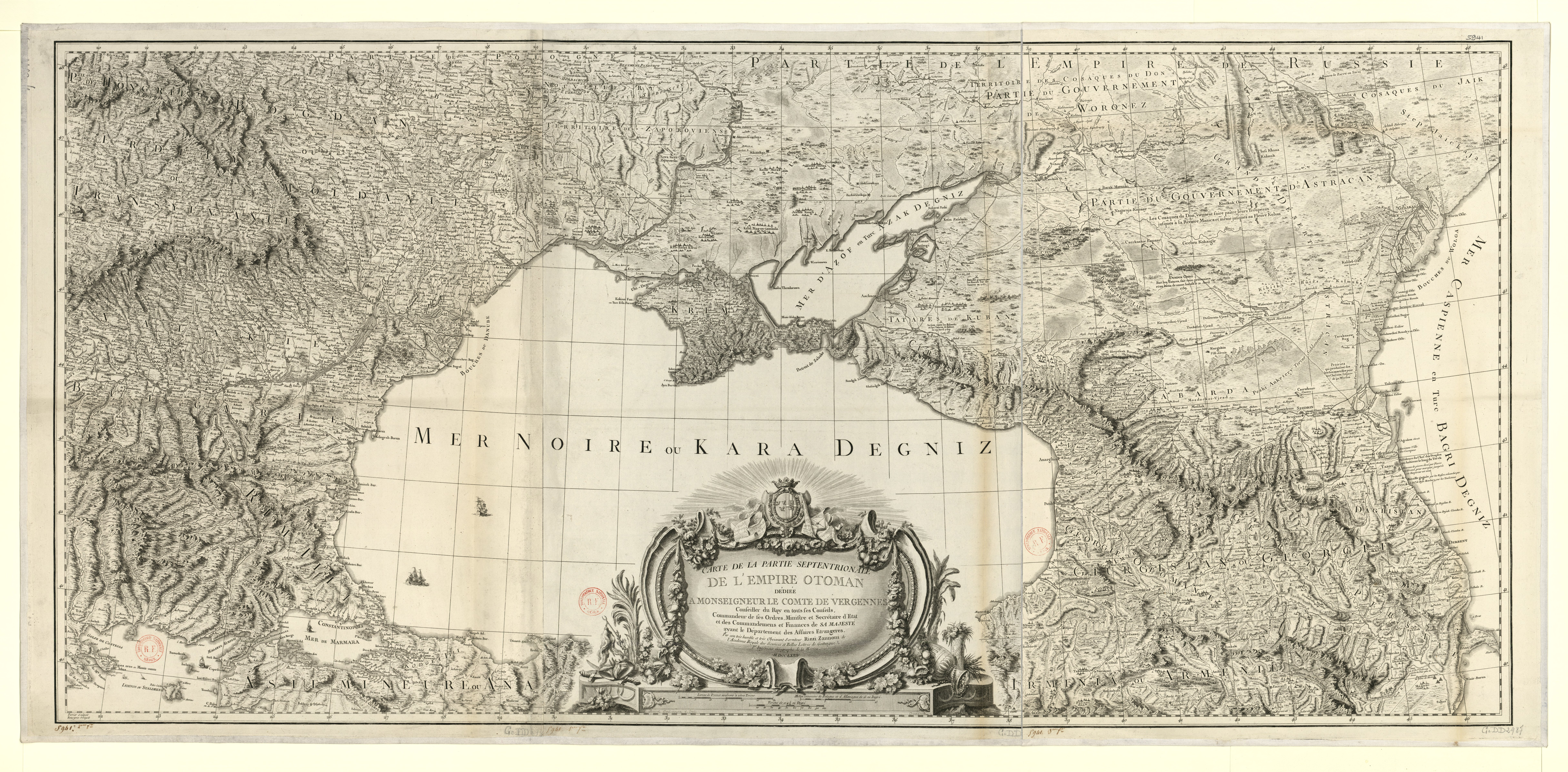 Carte de la partie septentrionale de l'empire otoman / Rizzi Zannoni ; Perrier sculpsit ; Bourgoin scripsit.